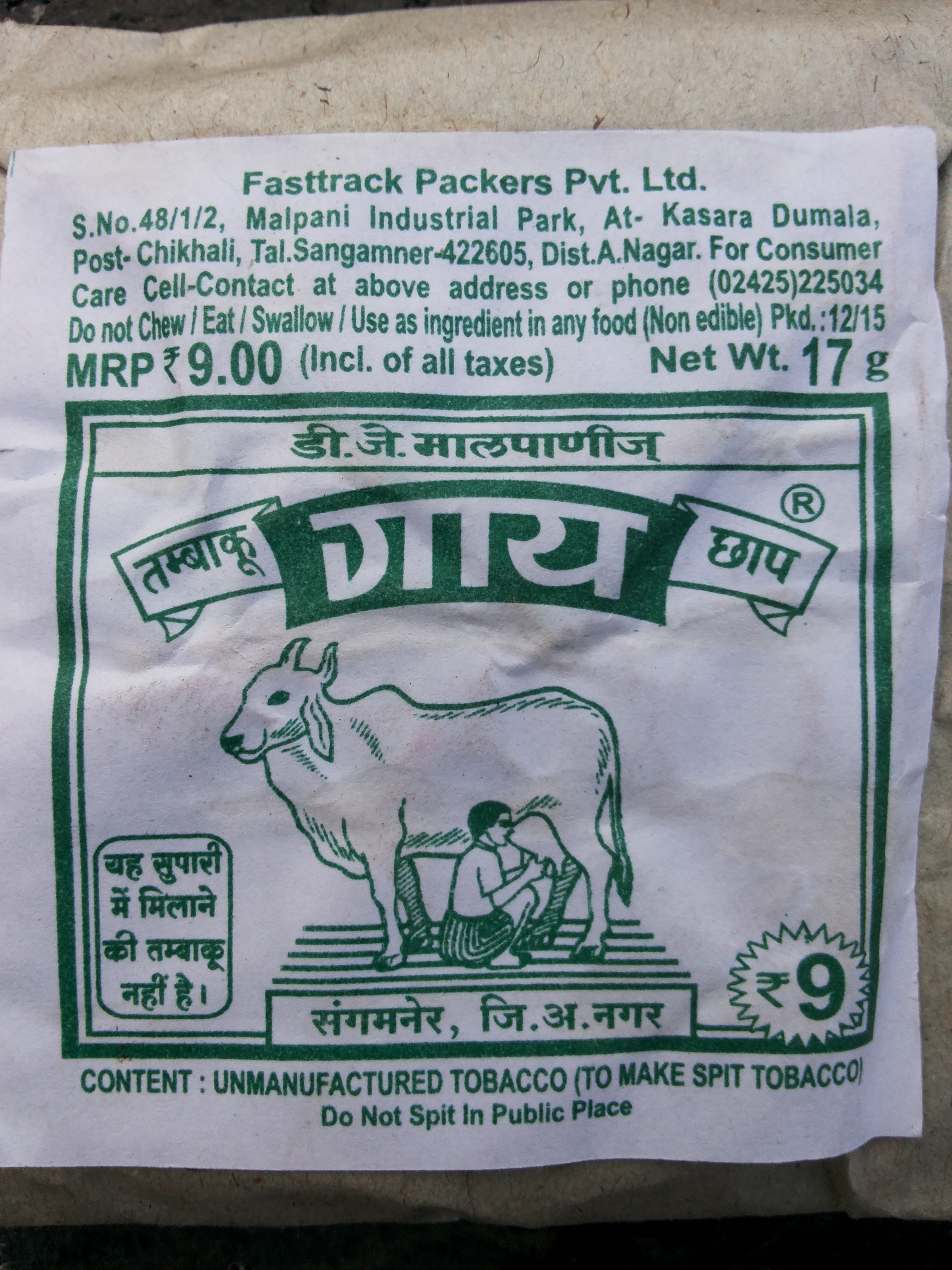 गाय छाप जर्दा पुडीच्या एका बाजूचे छायाचित्र